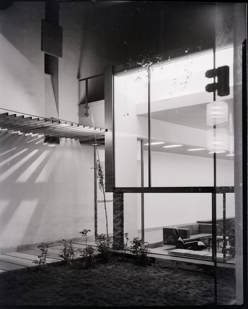 Servizio fotografico : Firenze, 1975 / Paolo Monti. - Buste: 25, Fototipi: 25 : Negativo b/n, gelatina bromuro d'argento/ pellicola ; 10x12. - ((Serie costituita da 25 negativi identificati con i nn.: 1761-1785. Numerazione parallela: 101-116, 122-130. Sulla busta G1761 manoscritto: "Arch. Detti/ Firenze". La suddetta serie è contenuta nella scatola identificata con la numerazione G1738/1798. Sul coperchio della scatola manoscritto: "Zodiac 2/ Arch. Detti - Firenze/ Sala disegni Uffizi". - Fonte: Rubrica di Paolo Monti: Archivio 10x12 (ultimi numerati) - dal G1 al (s.d.), presso Archivio Paolo Monti